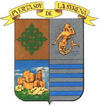 escudo de la localidad extremeña de Villanueva de la Serena, creación de Jesús García Trujillo.